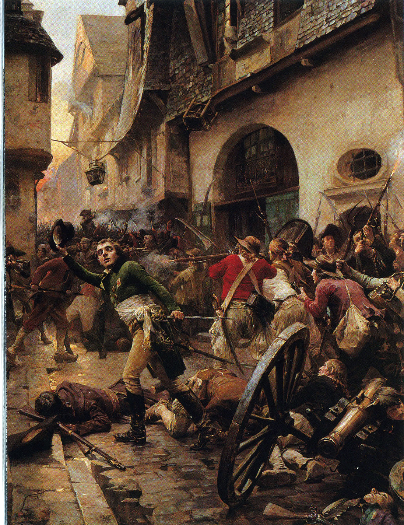 Henri de La Rochejacquelein au combat de Cholet en 1793